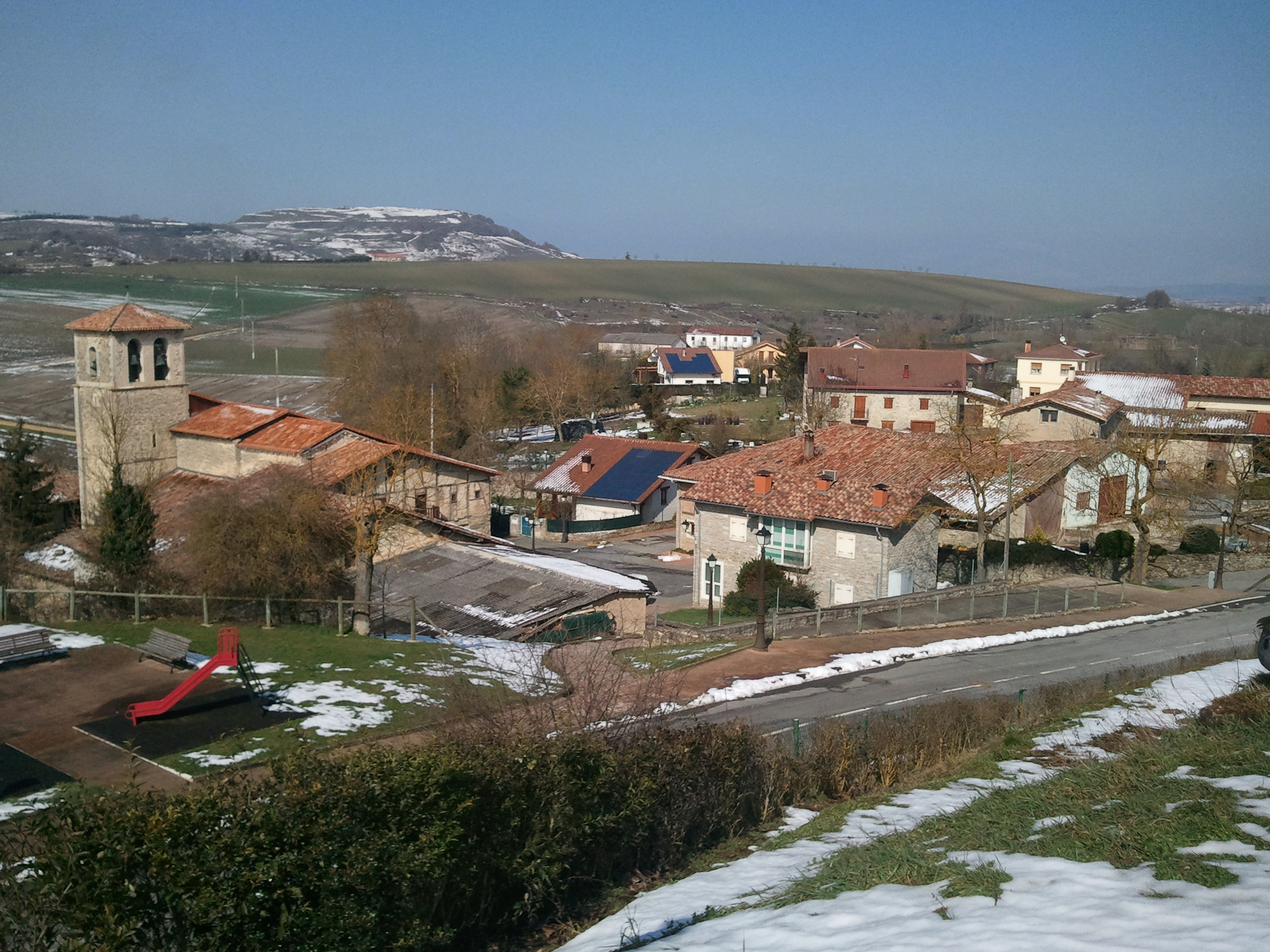 Monasterioguren (Gasteiz)